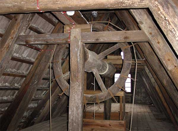 Die Windenanlage des Hauses der Architekten in der Wokrenter Straße 40, Rostock